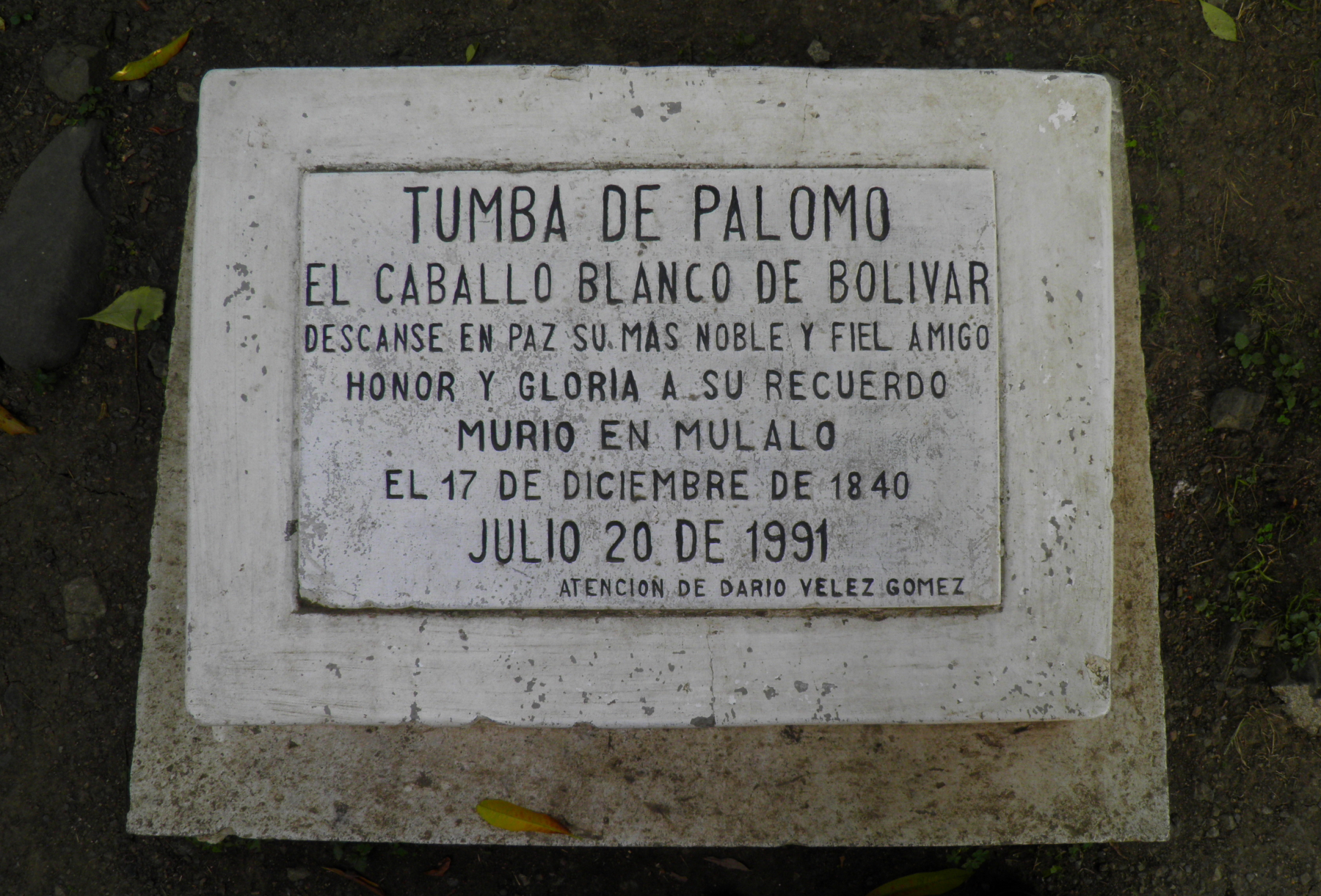 TUMBA DE PALOMO EL CABALLO BLANCO DE BOLIVAR DESCANSE EN PAZ SU MAS NOBLE Y FIEL AMIGO HONOR Y GLORIA A SU RECUERDO MURIO EN MULALO EL 17 DE DICIEMBRE DE 1840 JULIO 20 DE 1991 ATENCION DE DARIO VELEZ GOMEZ Mulaló Valle del Cauca Colombia